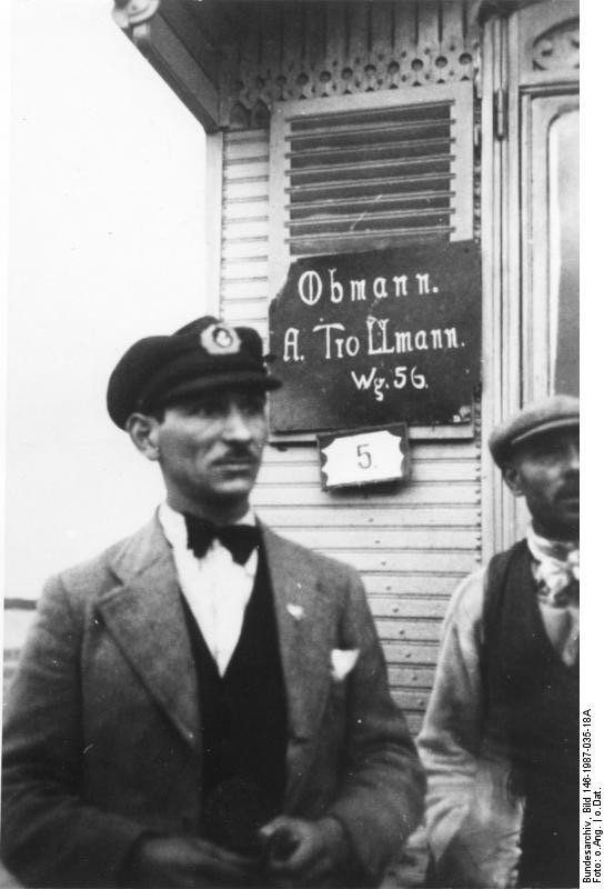 Zigeunerlager Berlin-Marzahn Obmann A. Trollmann